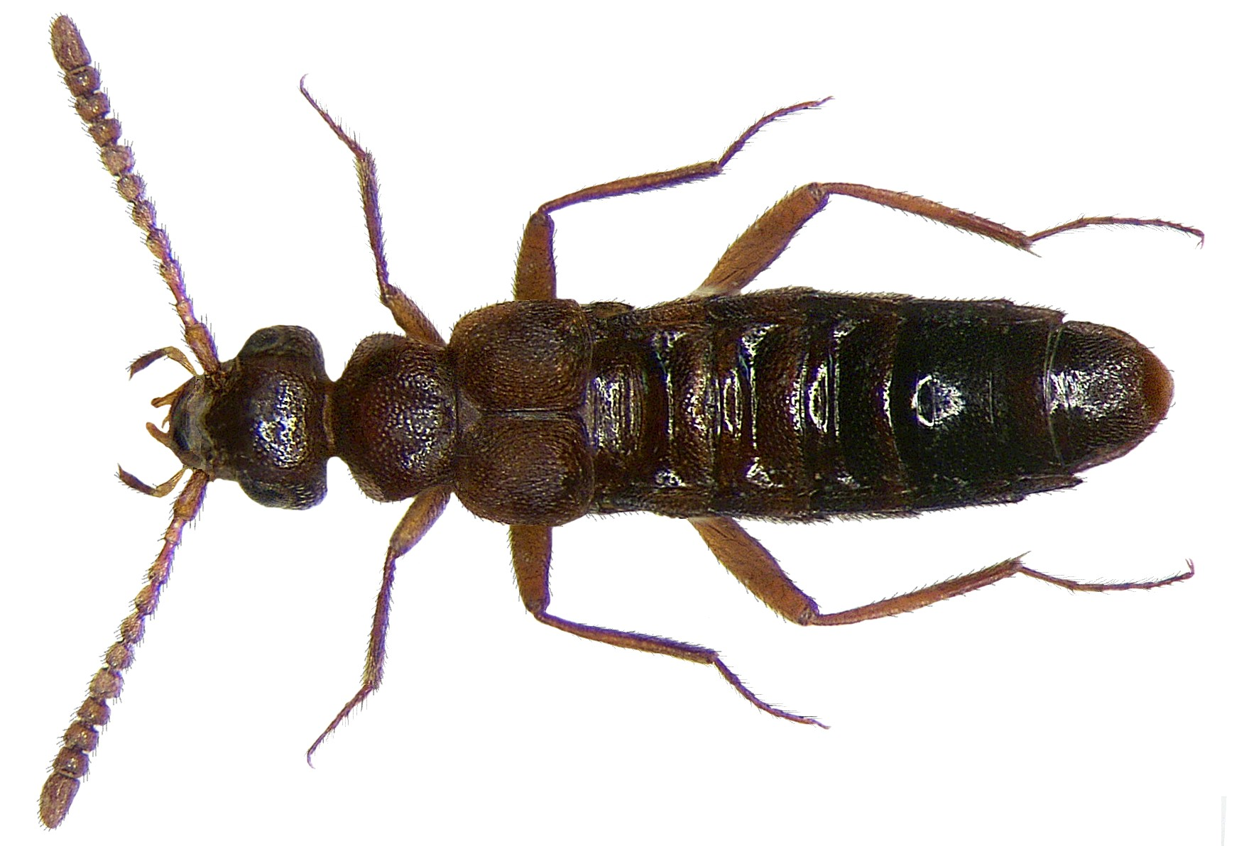 Familie: Staphylinidae Grösse: 4,8 mm Fundort: Kenia, Tsavo National Park, Kilaguni Lodge leg. U.Schmidt, 1991; det. R.Pace, 2007 Foto: U.Schmidt, 2008